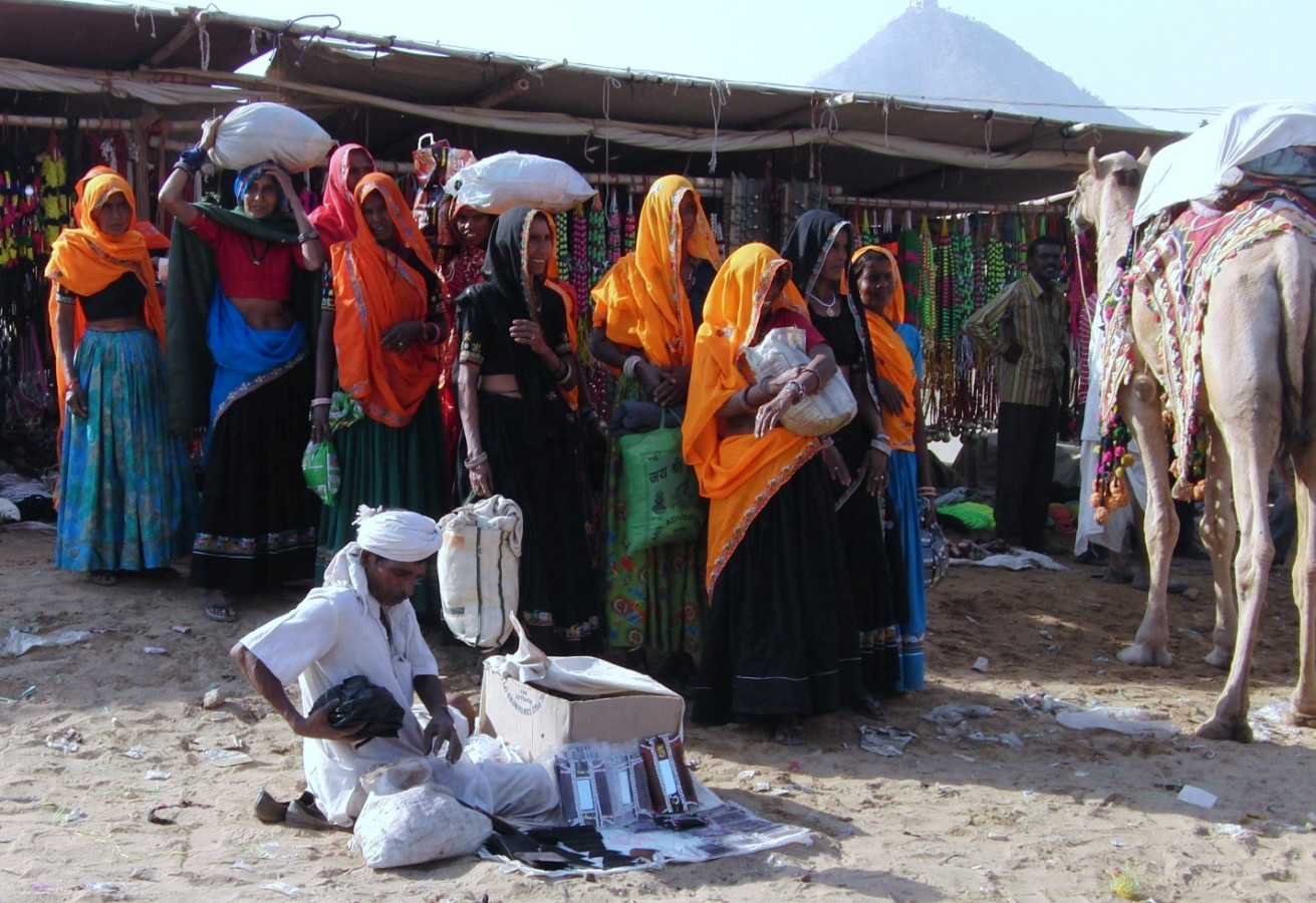 Le marché aux chameaux de Pushkar au Rajasthan en Inde.